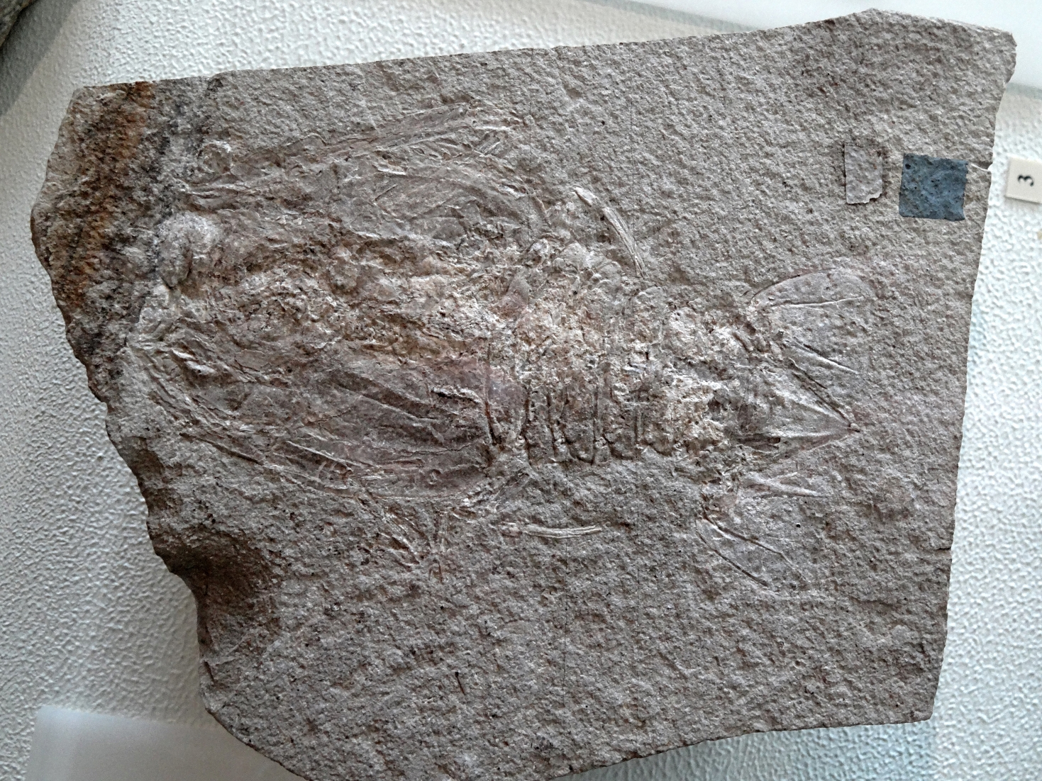 Krebs Eryon hartmanni, Oberseite dem Schwarzen Jura der Fränkische Alb; Fundort nahe Bad Staffelstein /Oberfranken; Exponat in der Petrefaktensammlung Kloster Banz